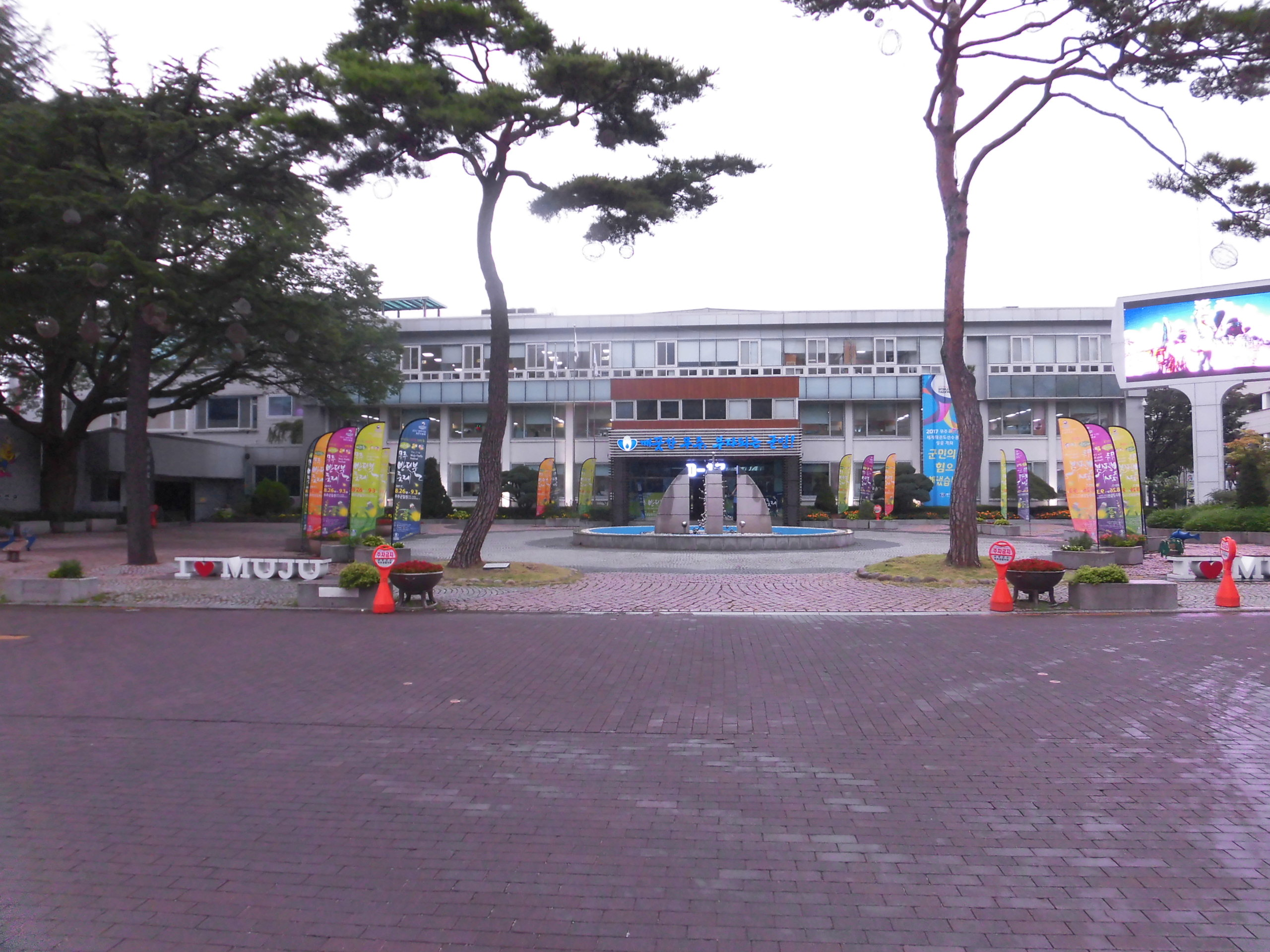 전라북도 무주군에 있느 무주군청